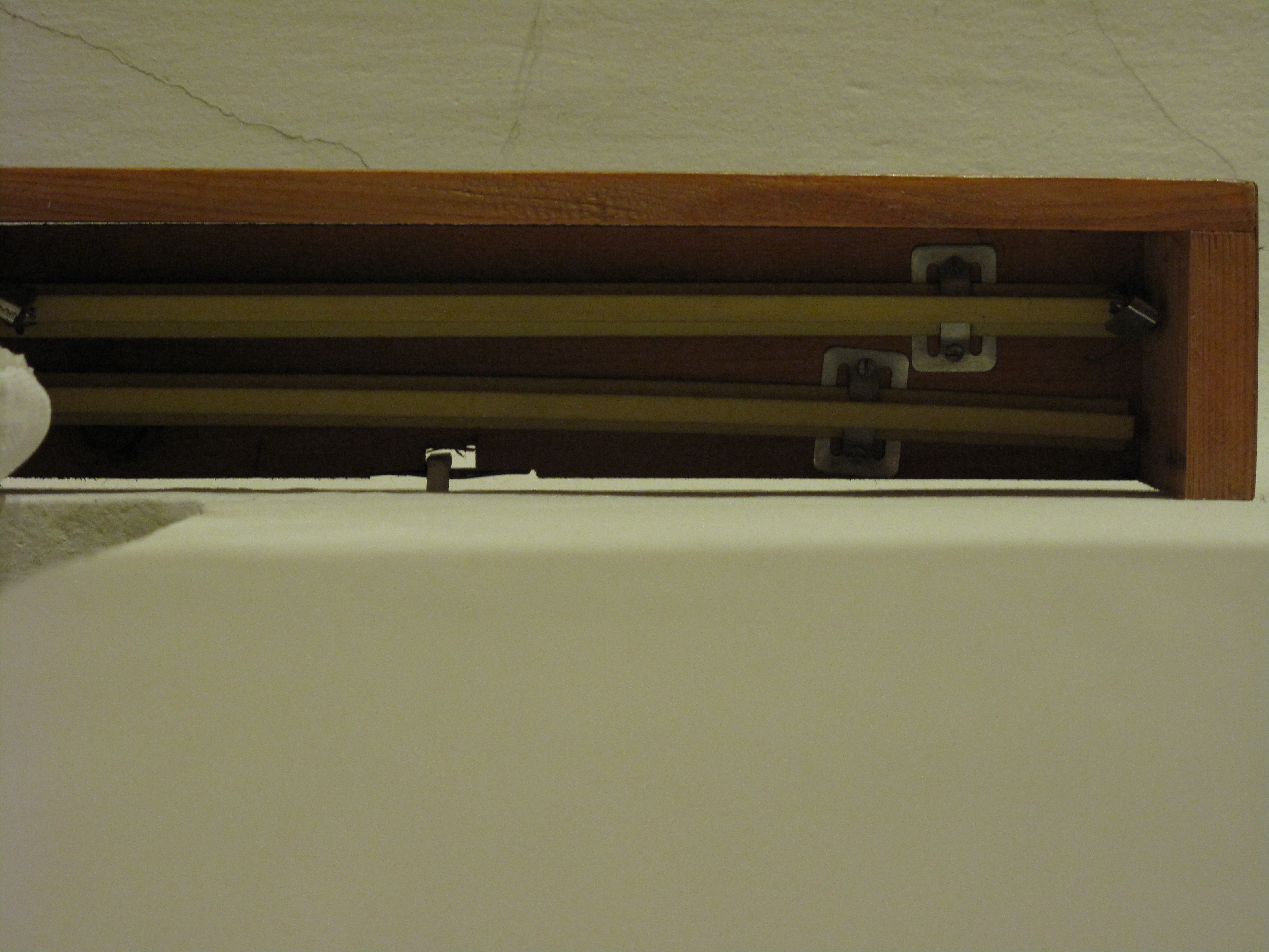 Dřevěná konzole ze spodu.